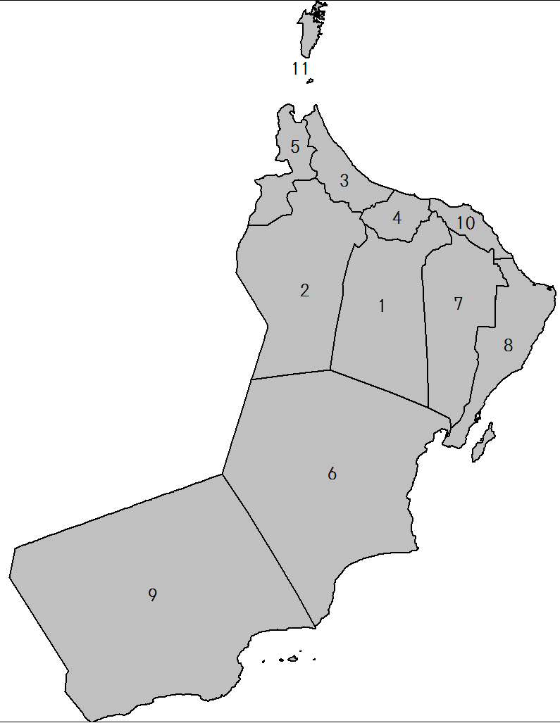 File:Oman districts.pngを元に、オマーン統計局（Sultanate of Oman, National Centre for Statistics and Information）が使用している行政区画区分を再現。（参考:City Population.de, OMAN: Administrative Division） ダーヒリーヤ（Ad Dakhiliyah） ザーヒラ（Ad Dhahirah） 北バーティナ（Al Batinah North） 南バーティナ（Al Batinah South） ブライミ（Al Buraimi） ウスタ（Al Wusta） 北シャルキーヤ（Ash Sharqiyah North） 南シャルキーヤ（Ash Sharqiyah South） ドファール（Dhofar） マスカット（Masqat） ムサンダムMusandam ※ , Omanでは、これとはまた違う行政区画が使用されている。